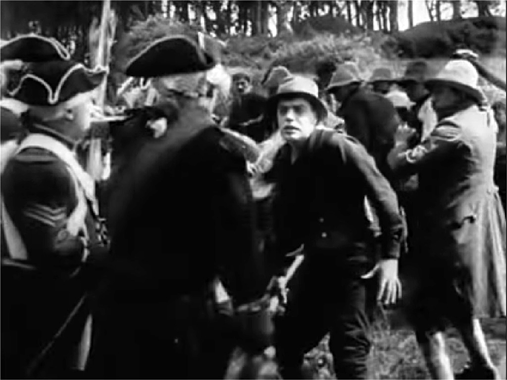 Bold Emmett Ireland's Martyr, film américain tourné en Irlande en 1914 et diffusé en 1915. Produit et réalisé par Sidney Olcott.